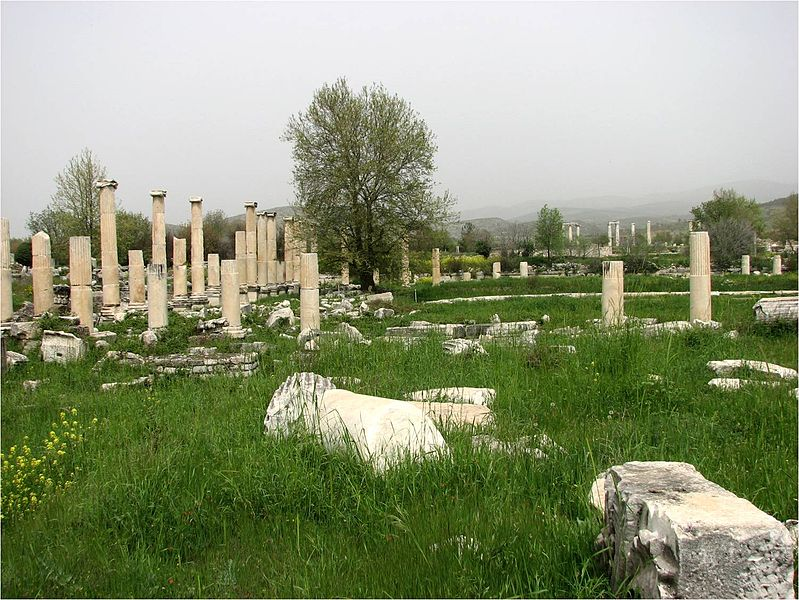 Aphrodisias Agorası